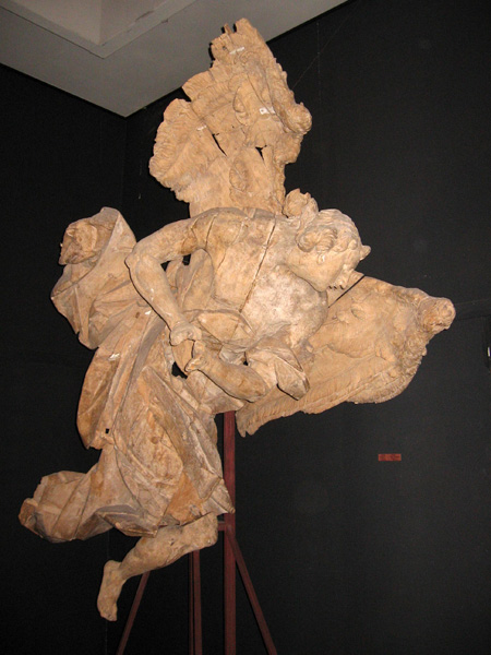 Янгол – Скульптура Йогана Георга Пінзеля